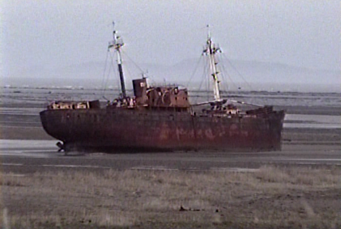 Pecio "Desdémona", frente al cabo San Pablo, océano Atlántico, sector este de la isla Grande de Tierra del Fuego, en la región austral de América del Sur. Pertenece al departamento Río Grande, de la provincia de Tierra del Fuego, Antártida e Islas del Atlántico Sur en el sur de la Patagonia argentina.